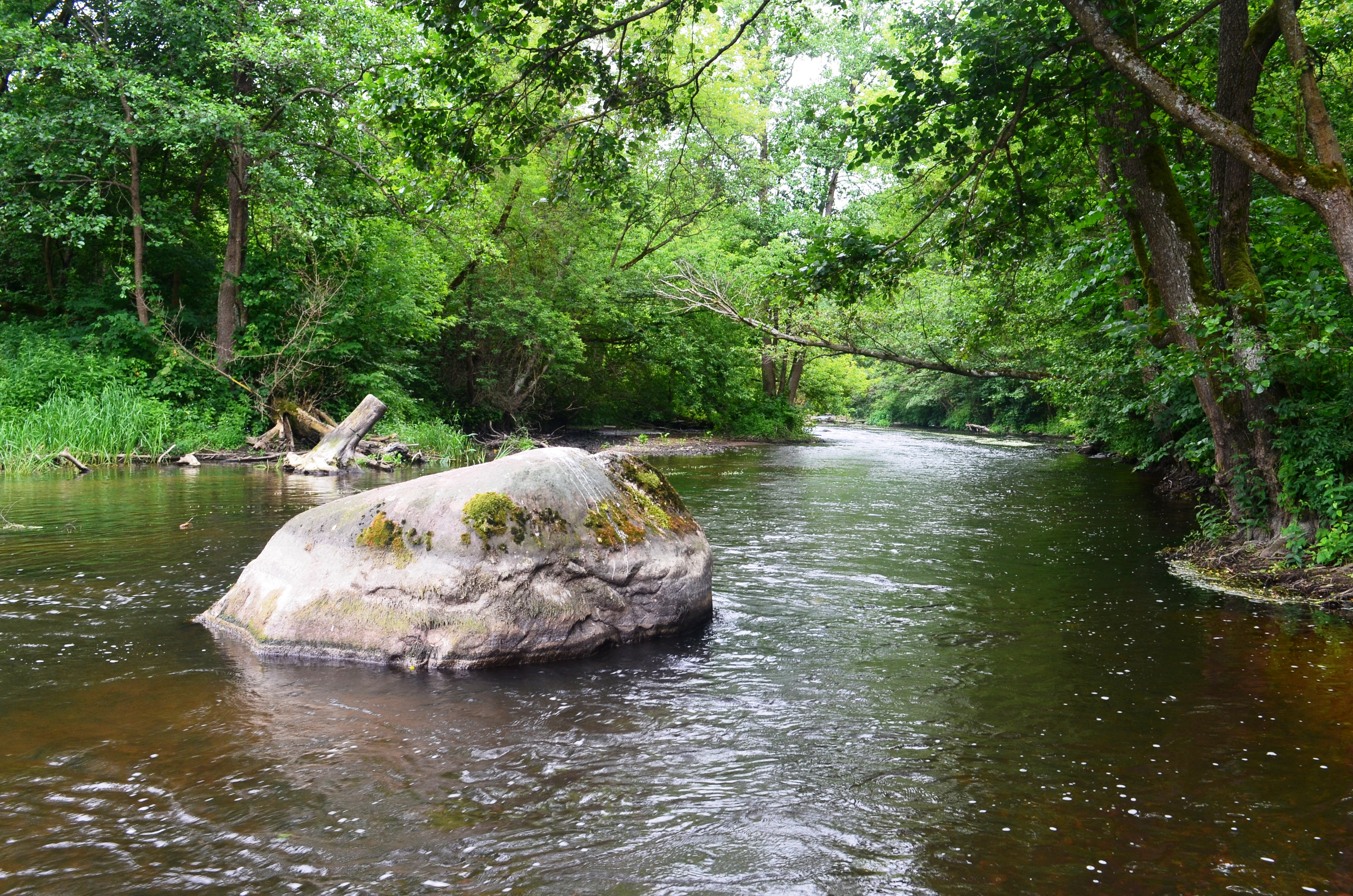 Vokės žiotys, Grigiškės, Vilnius